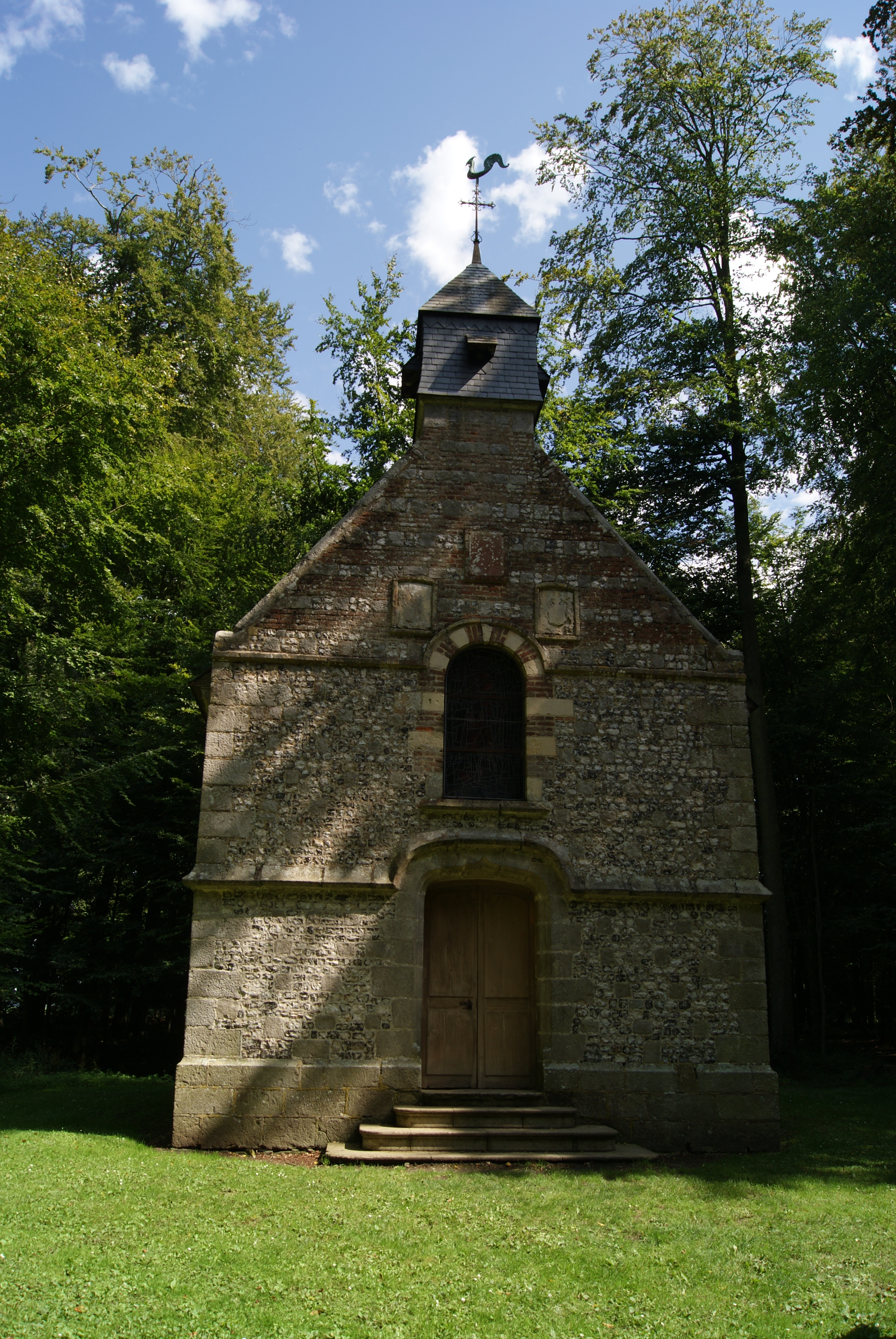 Chapelle du Château de Miromesnil à Saint-Aubin-sur-Scie (76) .